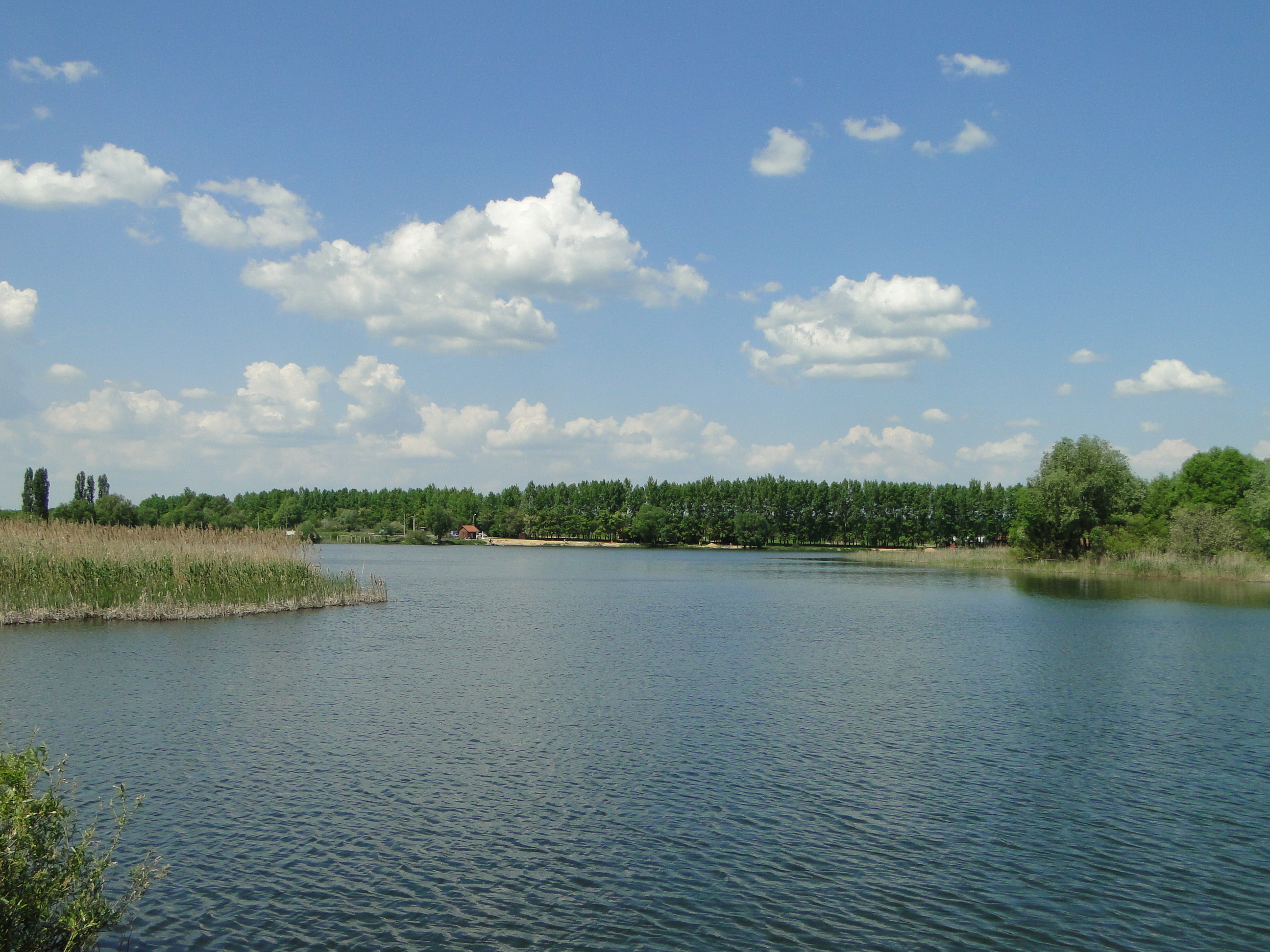 Лаптевский пруд. Майский день